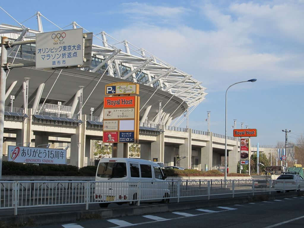 国道20号線。東京スタジアム。味の素スタジアム。東京オリンピックマラソン折り返し地点。東京都調布市。